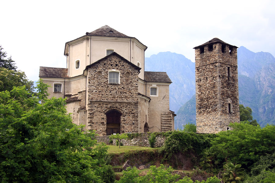 Chiesa della Madonna della Guardia a Ornavasso (VB)